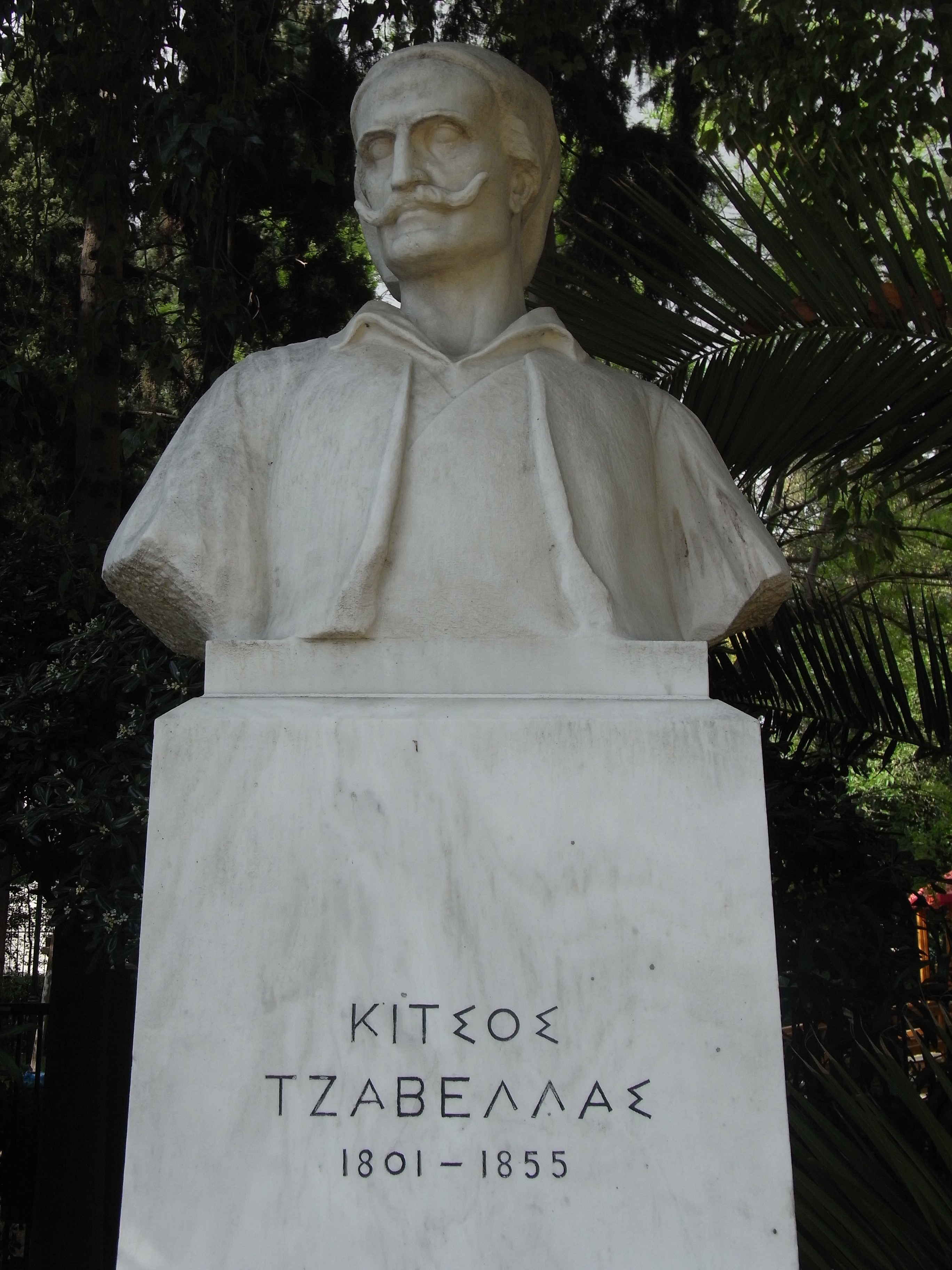 Les combattants de 21 (Αγωνιστές του 21)